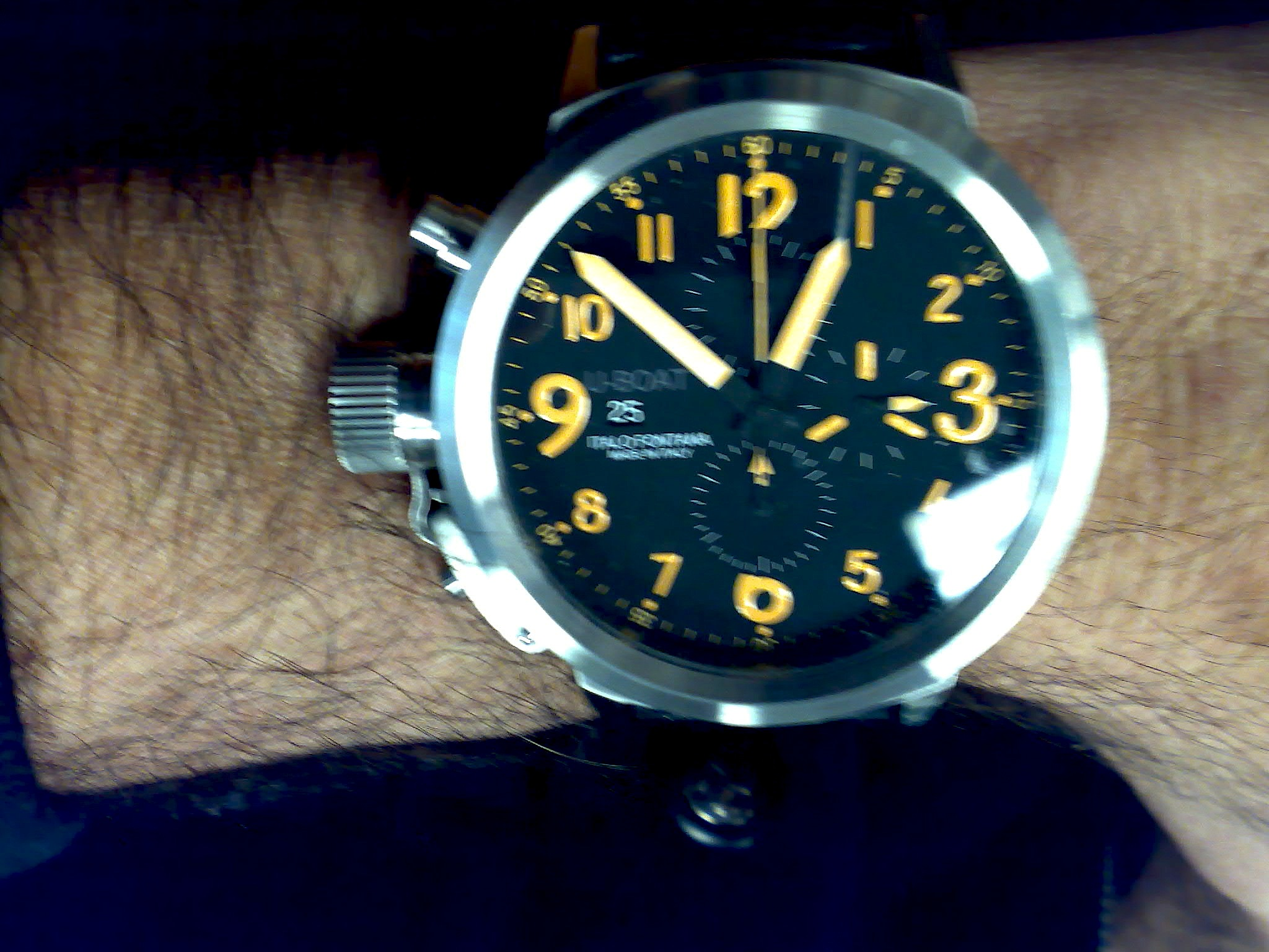 (not mine)